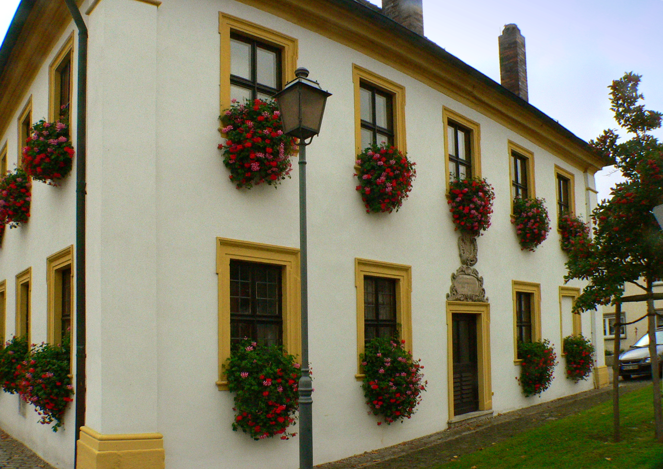 Historisches Rathaus in Obertheres am Main